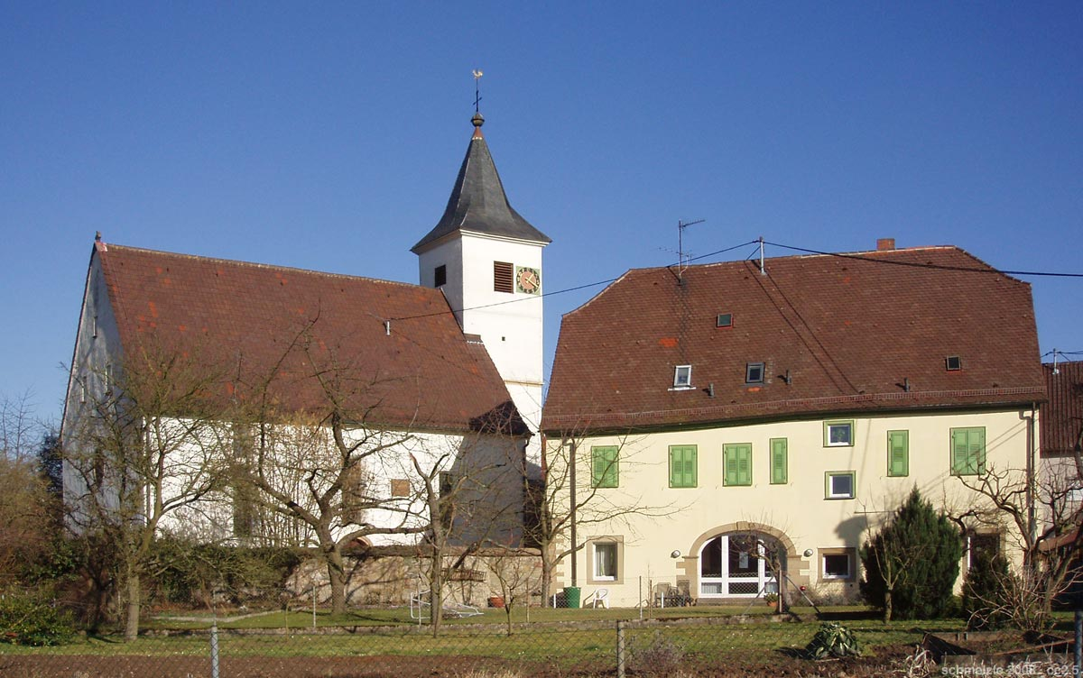 Georgskirche in Heilbronn-Horkheim mit zugehörigem Pfarrhaus, von Westen aus gesehen